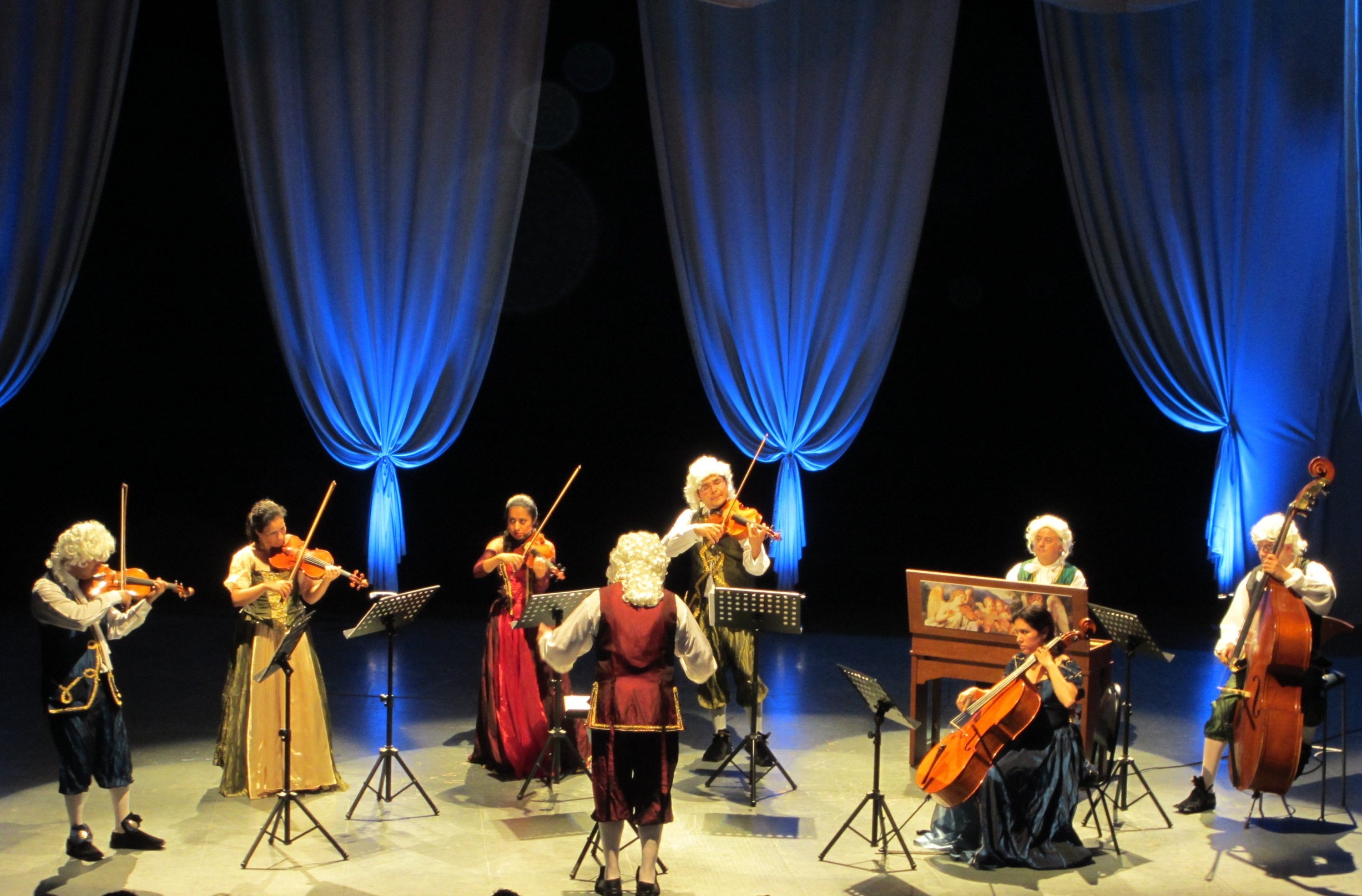 La Orquesta "Viva Vivaldi" presentandose en el Teatro Esperanza Iris, durante el 6to. Festival Cultural Ceiba 2012, en la ciudad de Villahermosa, Tabasco, México.